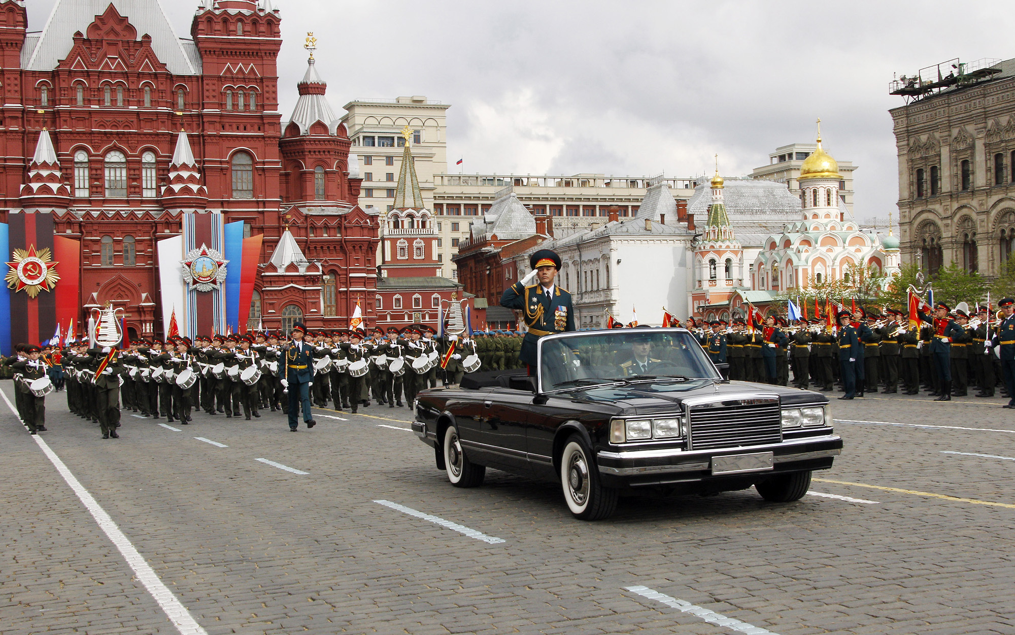 Die Militärparade zum 66-jährigen Jubiläum des Sieges in Moskau im Jahr 2011.